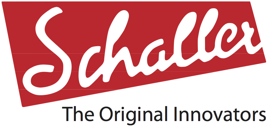 Logo von Schaller Electronics, deutscher Hersteller von Zubehör für Musikinstrumente